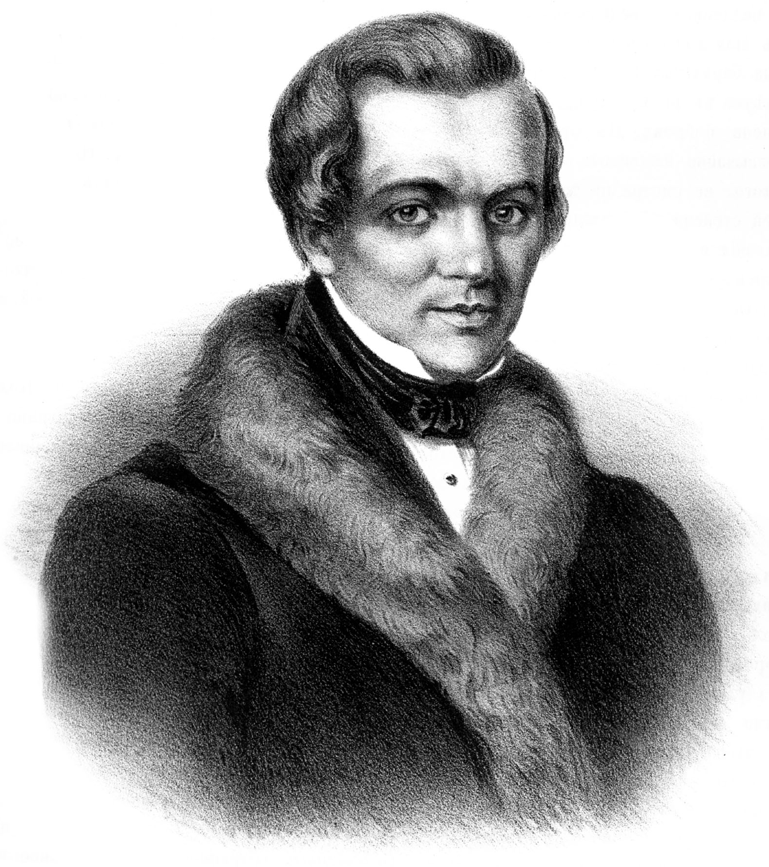 A. KALTZOW. Лит. А. Мюнстера, СПБ. Imp. Lith. A. Munster (Editeur)